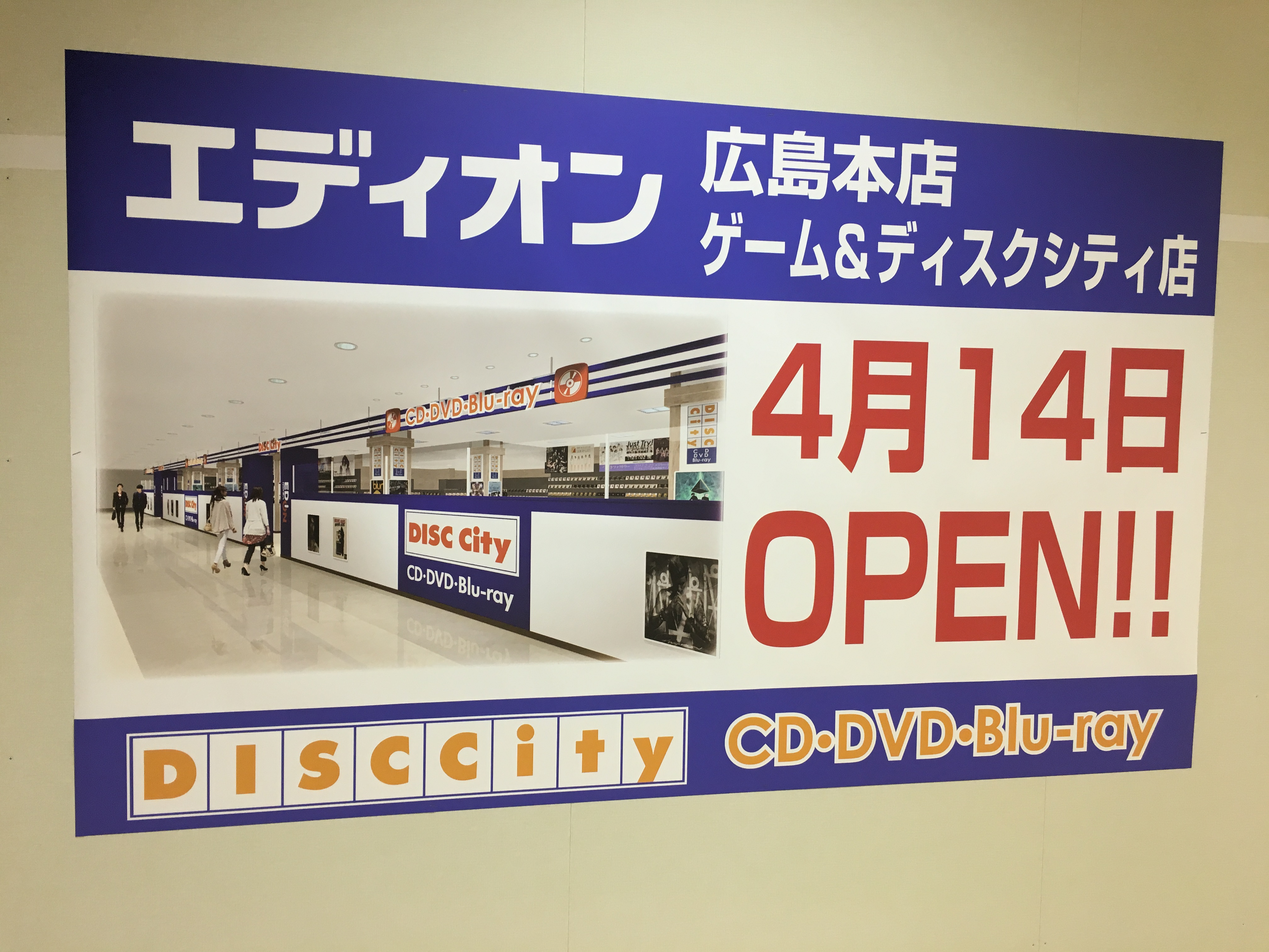 エディオン広島本店のサンモール1F売り場の開店予告